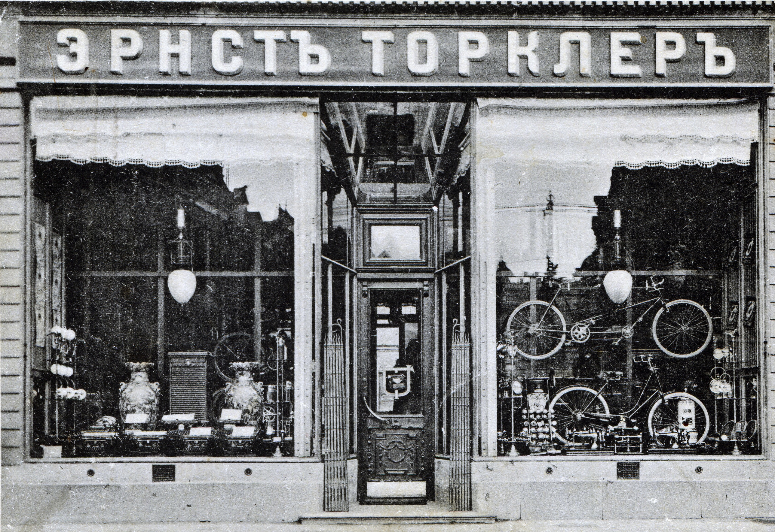 Крамниця Ернста Торклера. Вулиця Хрещатик, 20. Велосипеди "Глорія" (25 крб.)